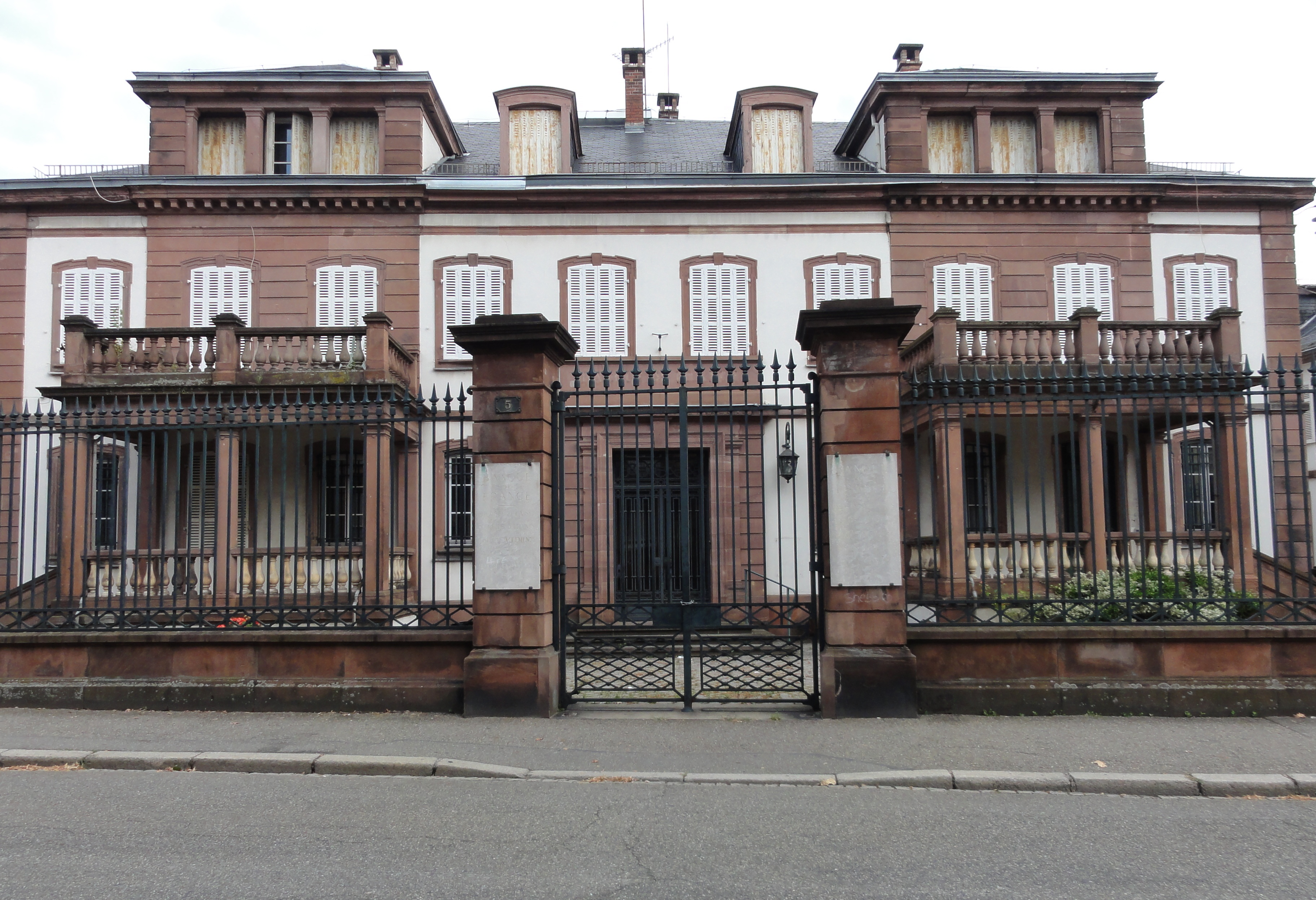 Alsace, Bas-Rhin, Haguenau, Immeuble 5 rue Saint-Georges.